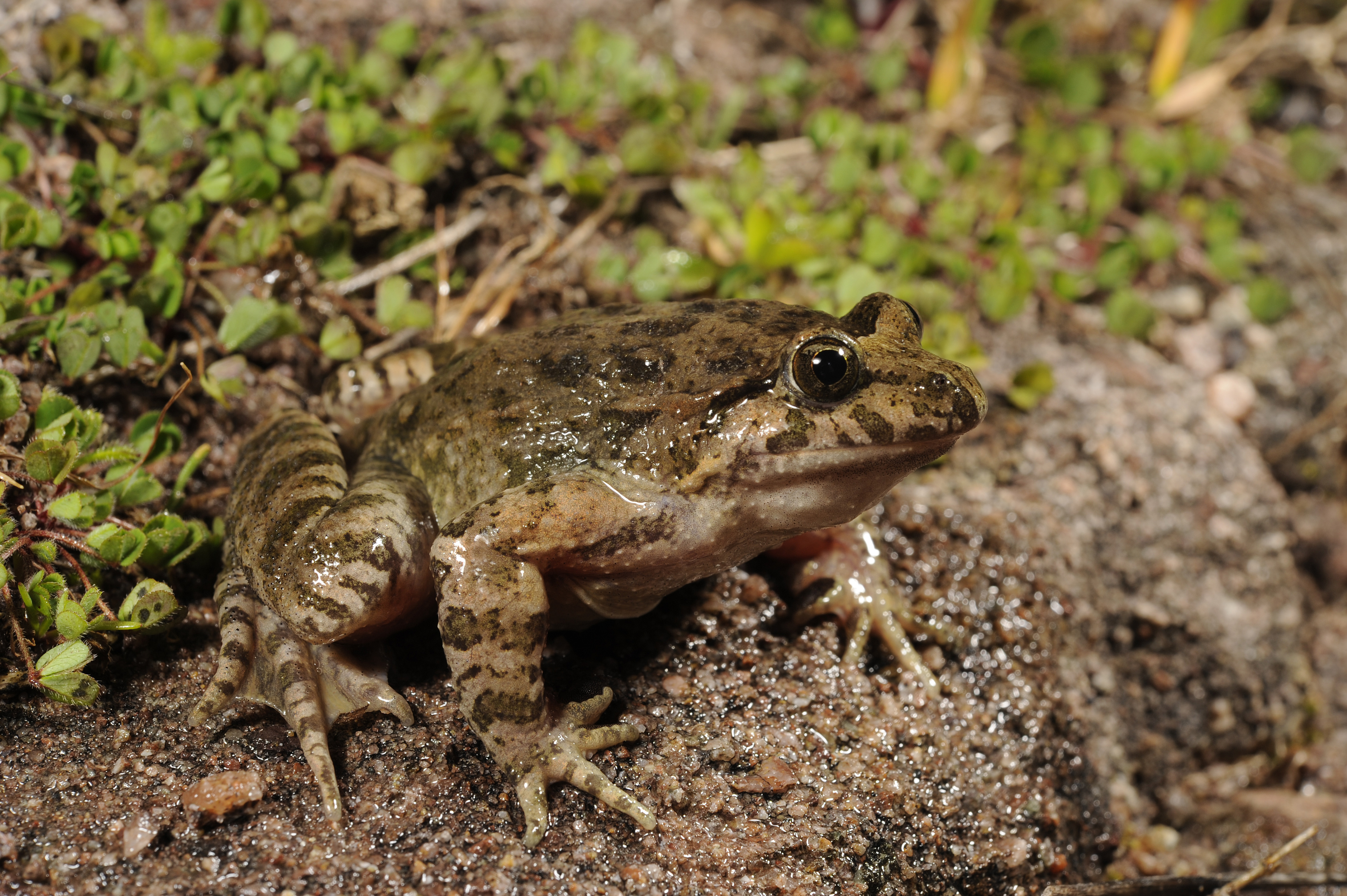 Sardischer Scheibenzüngler von Sardinien/Italien